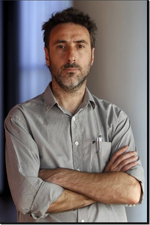 Diputado Nacional Juan Carlos Villalonga